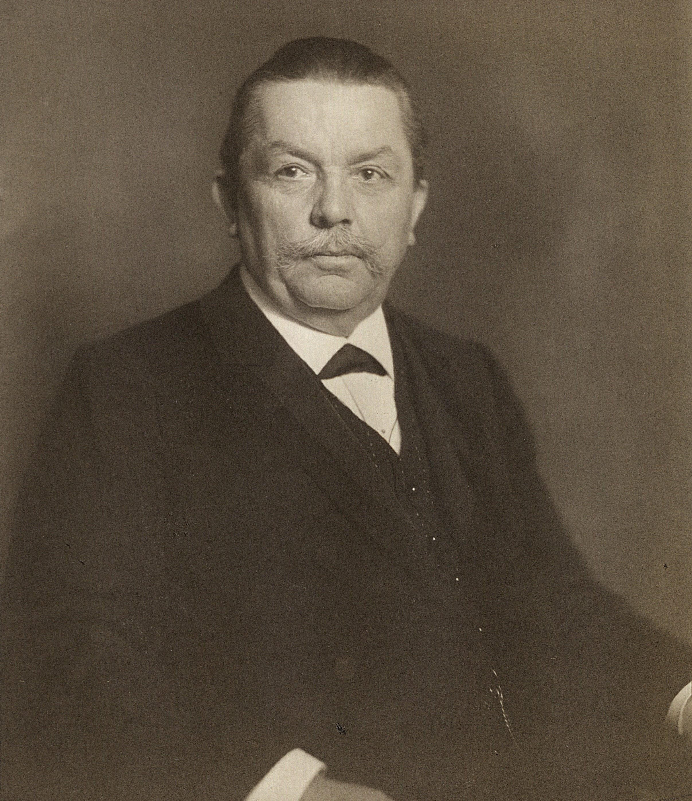 Schulratspräsident 1905-1926